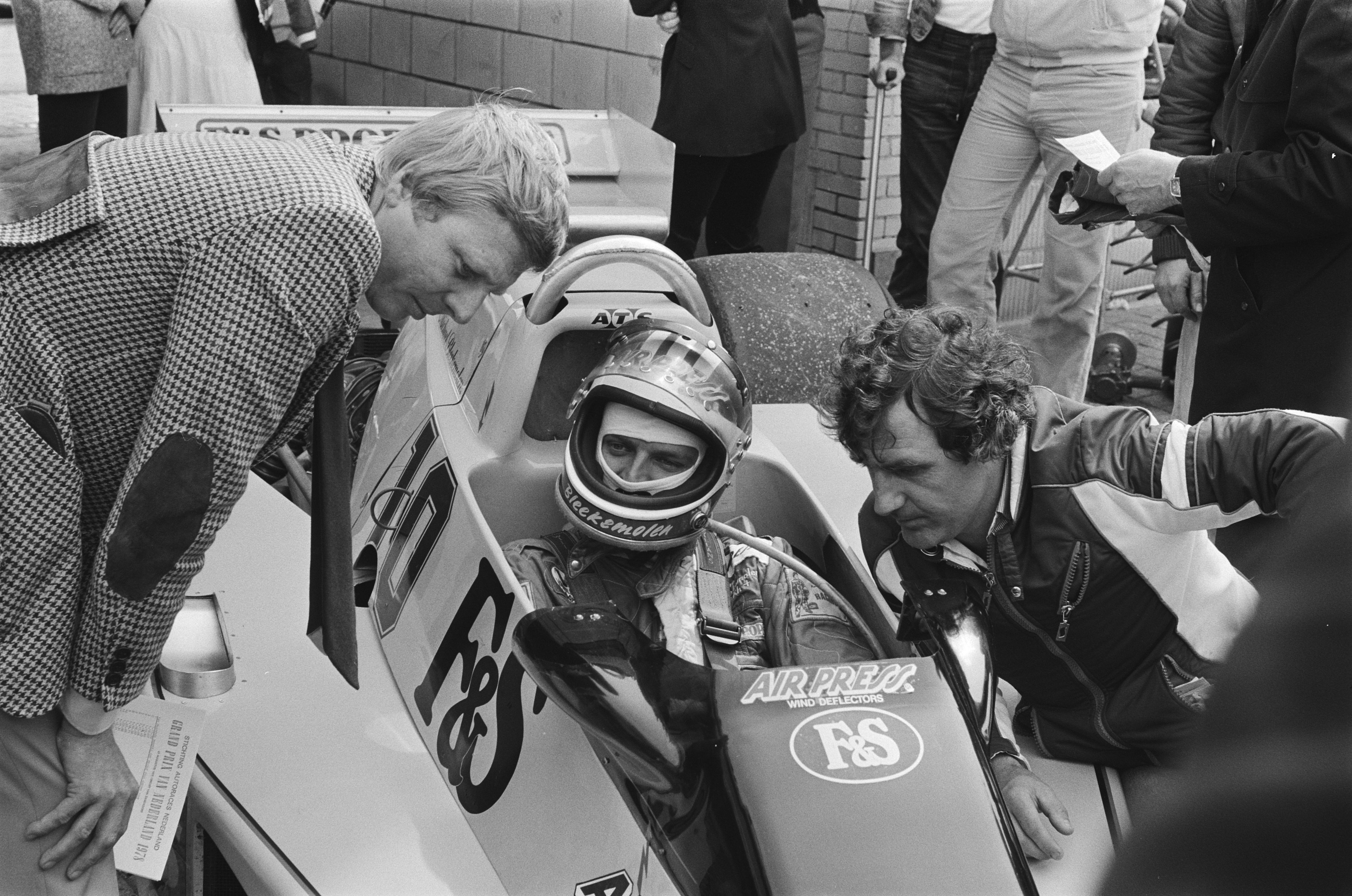 Training Grand Prix Zandvoort; Michel Bleekemolen (m) en Gijs van Lennep (l) en Toine Hezemans.